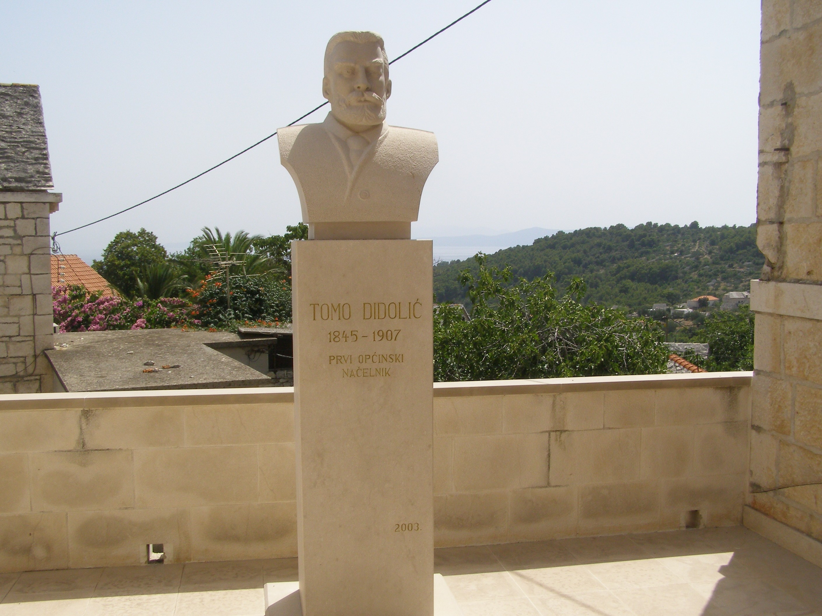 Tomo Didolic statue, Selca, Brac, Croatia